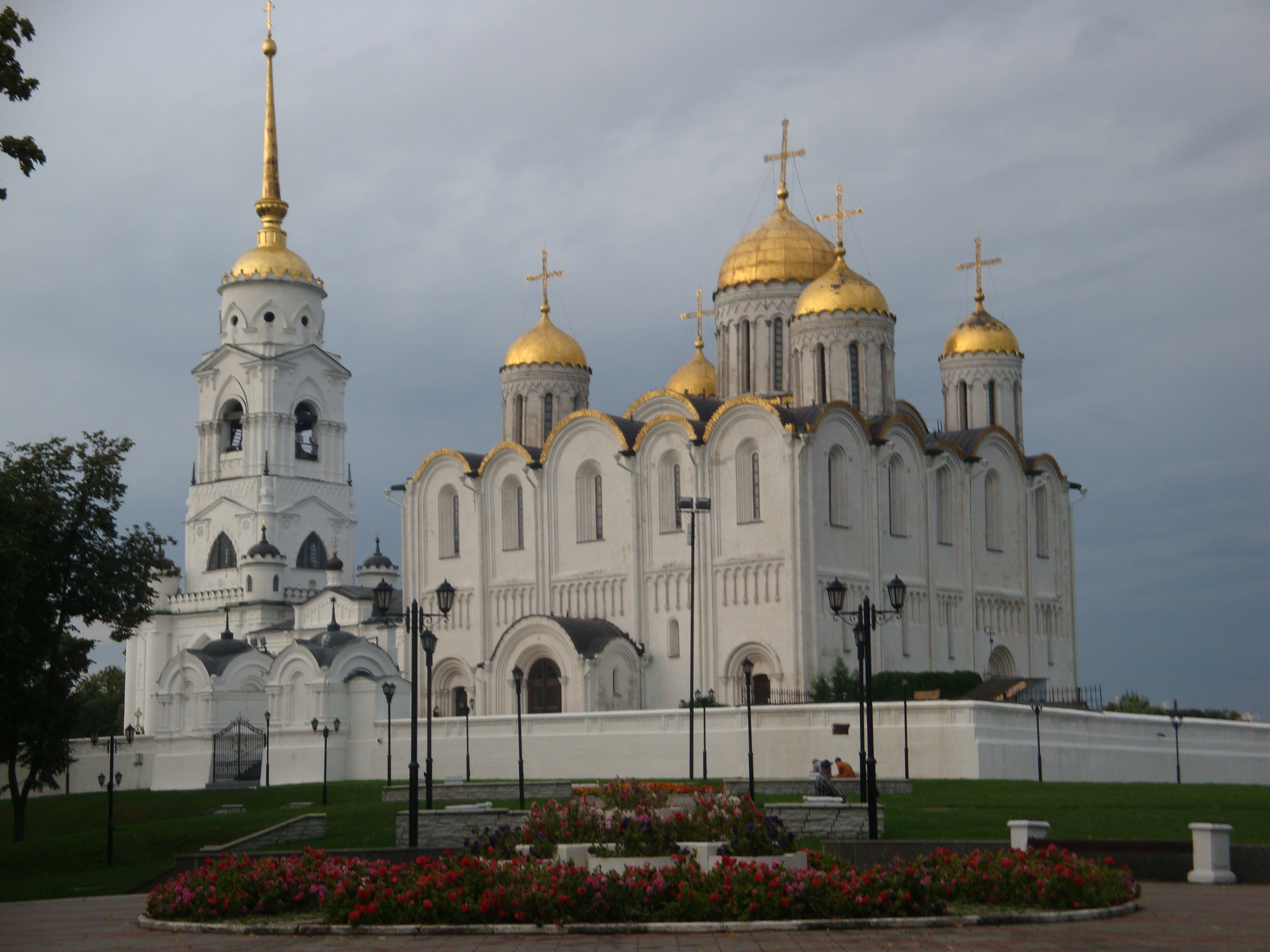 Собор Успенский (собор Успенский и колокольня) (Владимирская область, Владимир, улица Большая Московская, 56)